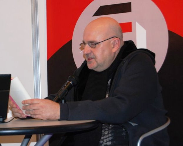 Antón Reixa no 2012.